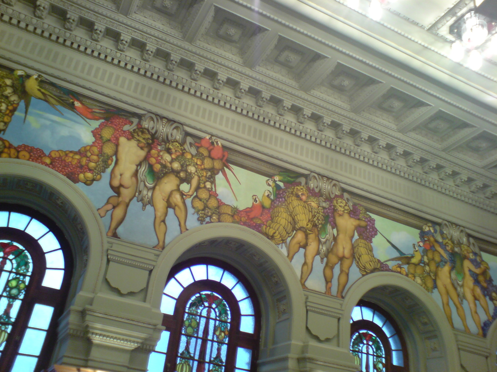 Teatro Pérez Galdós, sala Saint Saëns en planta principal, decoración y lienzos de Nestor Martín Fernández de la Torre. 2007 Las Palmas de Gran Canaria.